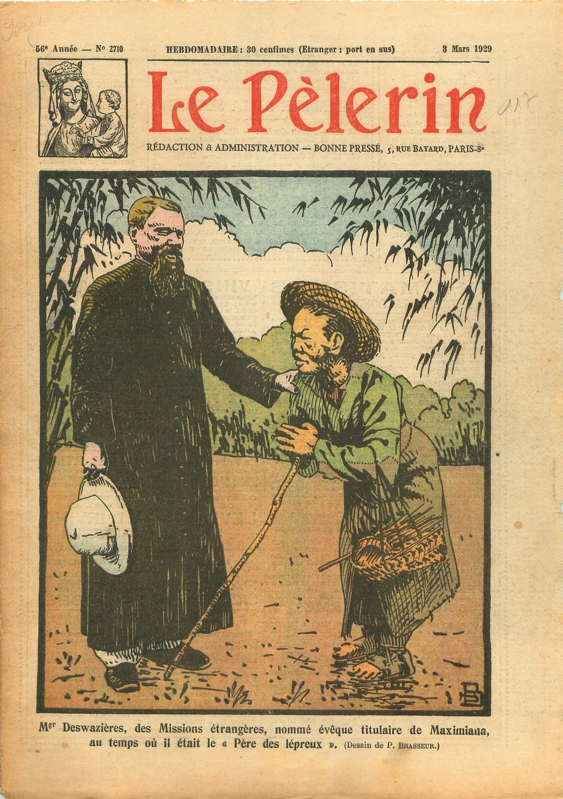 Couverture du Pèlerin du 3 mars 1929 représentant Mgr Deswazières avec un lépreux chinois.